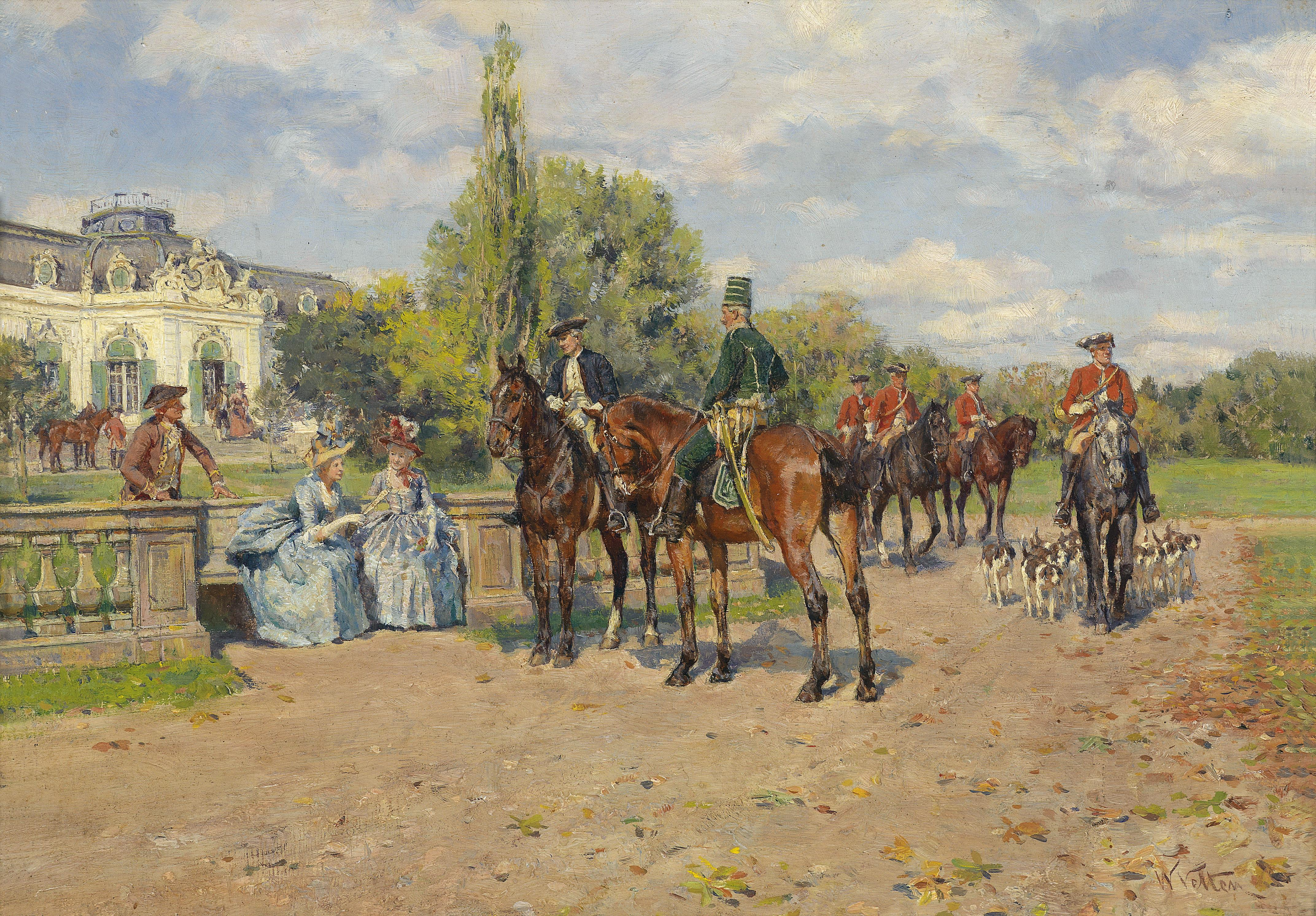 Jagdgesellschaft vor dem Schloss, signiert W. Velten, Öl auf Holz, 22 x 31 cm